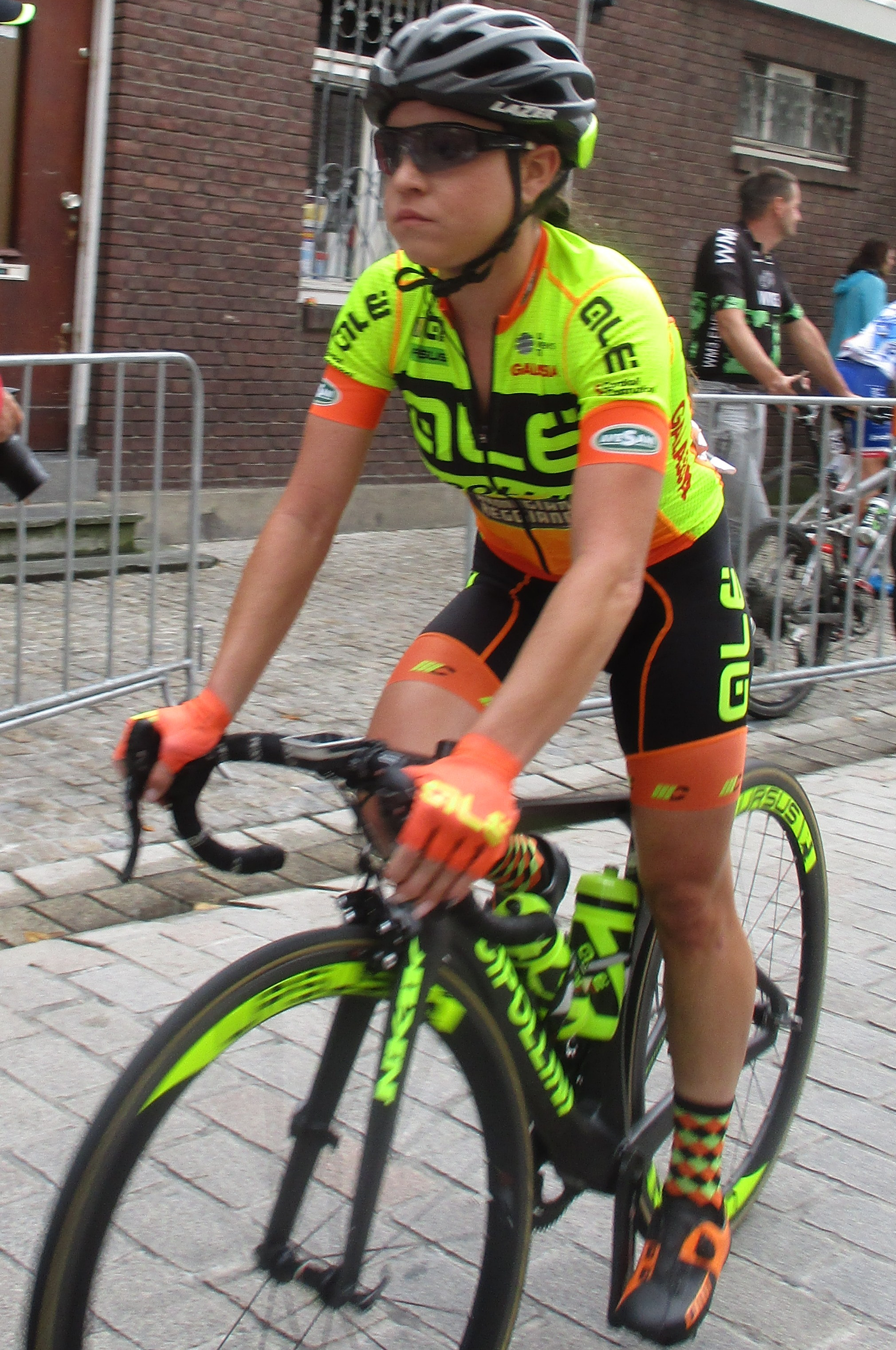 5e etappe van de Boels Ladies Tour 2017 door Zuid-Limburg, finish in Vaals.